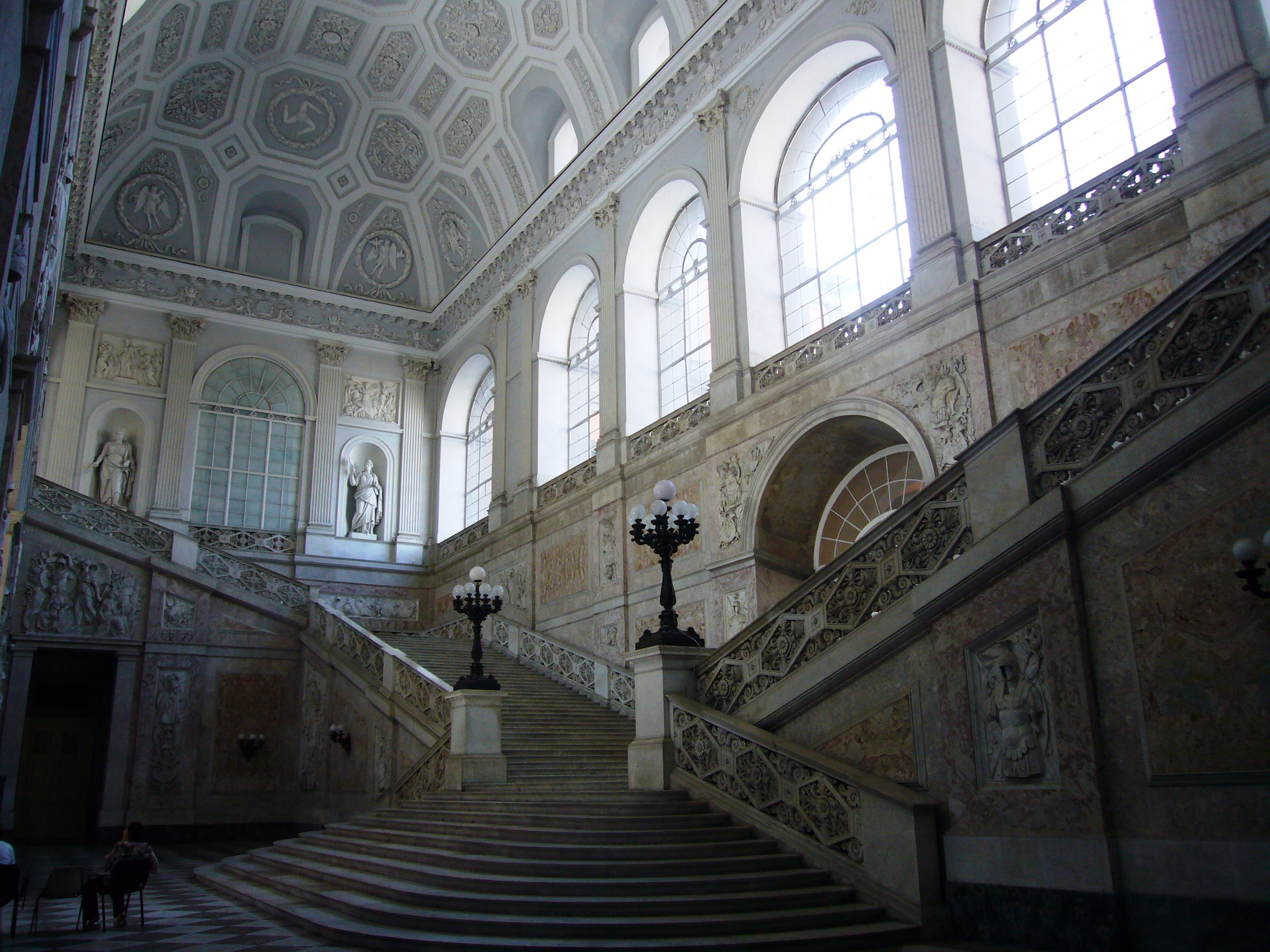 Napoli, Palazzo reale: ingresso e scalone sinistro